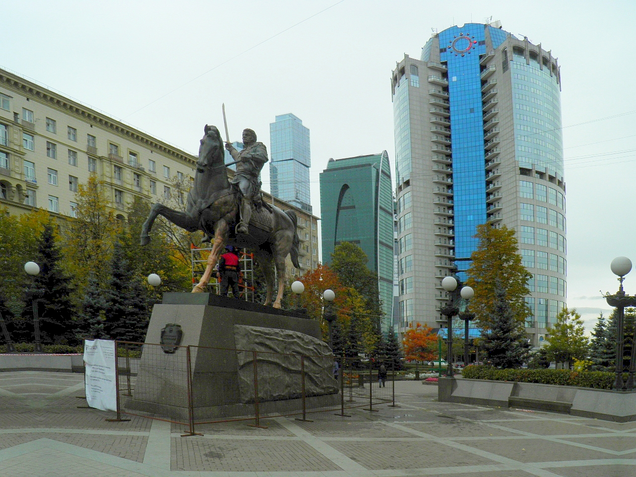 скульптура князьБАГРАТИОН.